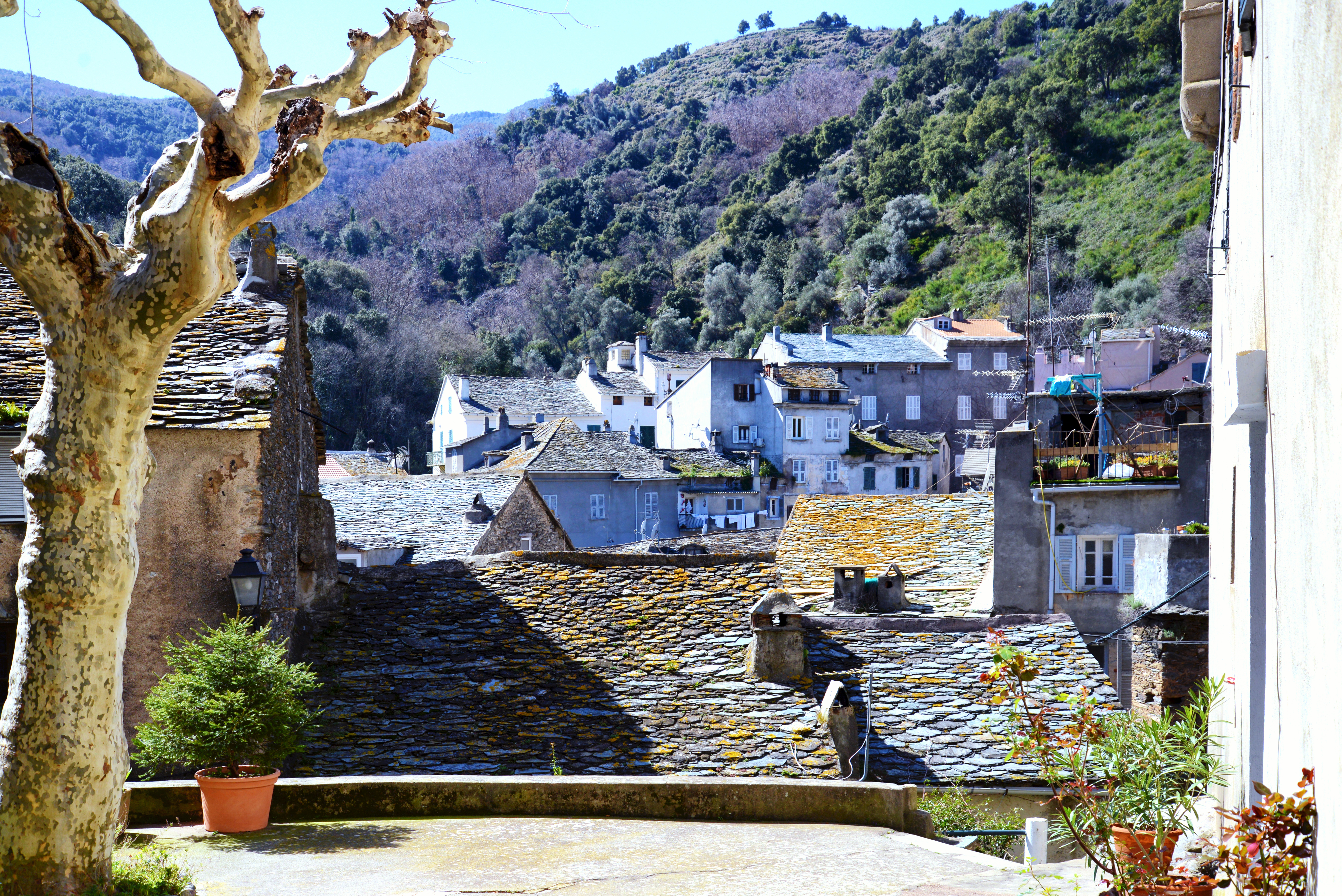 Vescovato, Casinca (Corse) - Partie occidentale du village vue depuis le castello Belfiorito, ancienne résidence épiscopale, sur le haut de la colline où se dresse aujourd'hui S. Martino, l'église principale du pays.